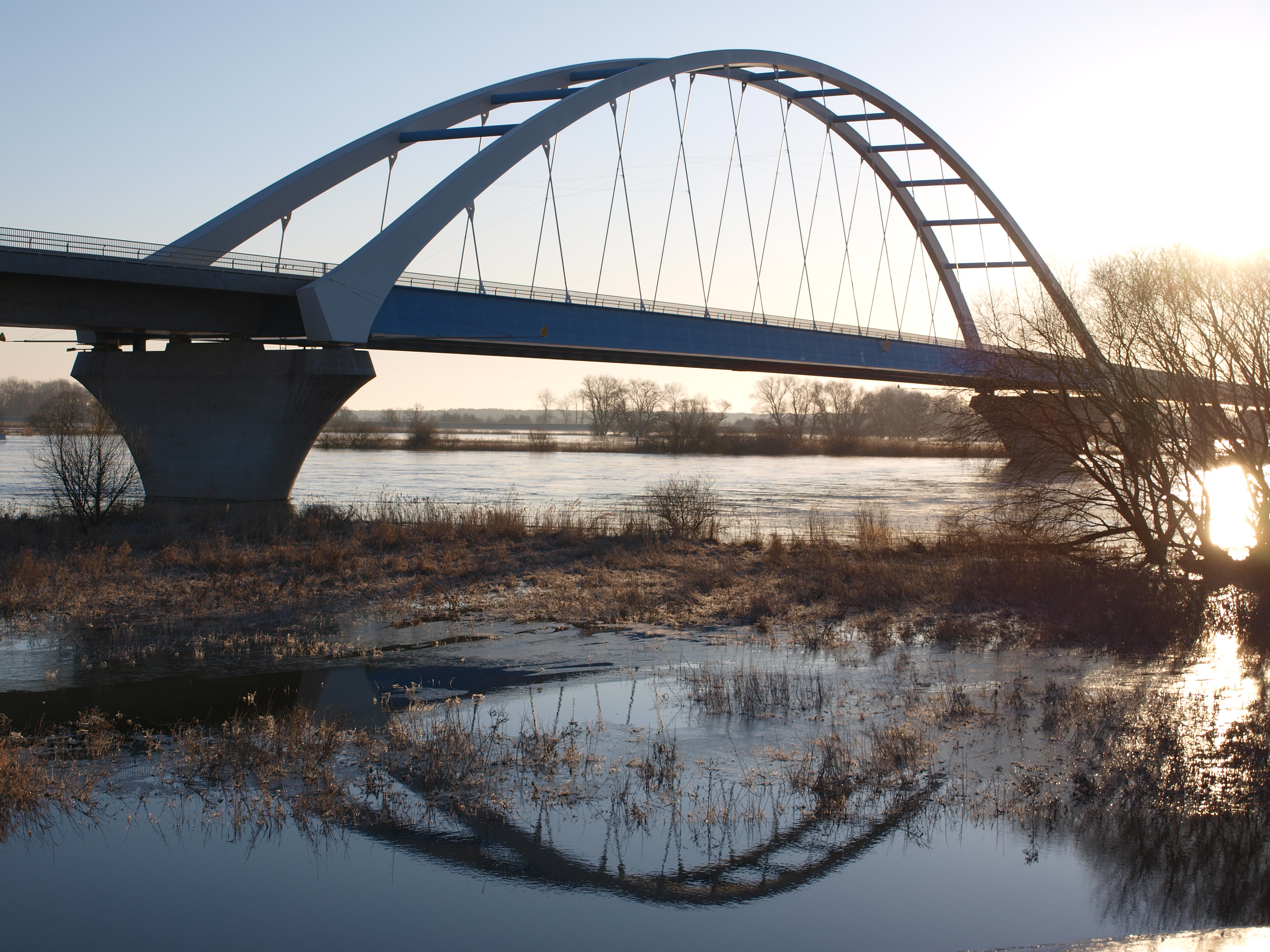 Tangermünder Elbbrücke in der früh